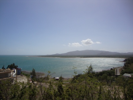 Vue de la baie prise depuis Pandope avec le massif de Tiébaghi en arrière-plan